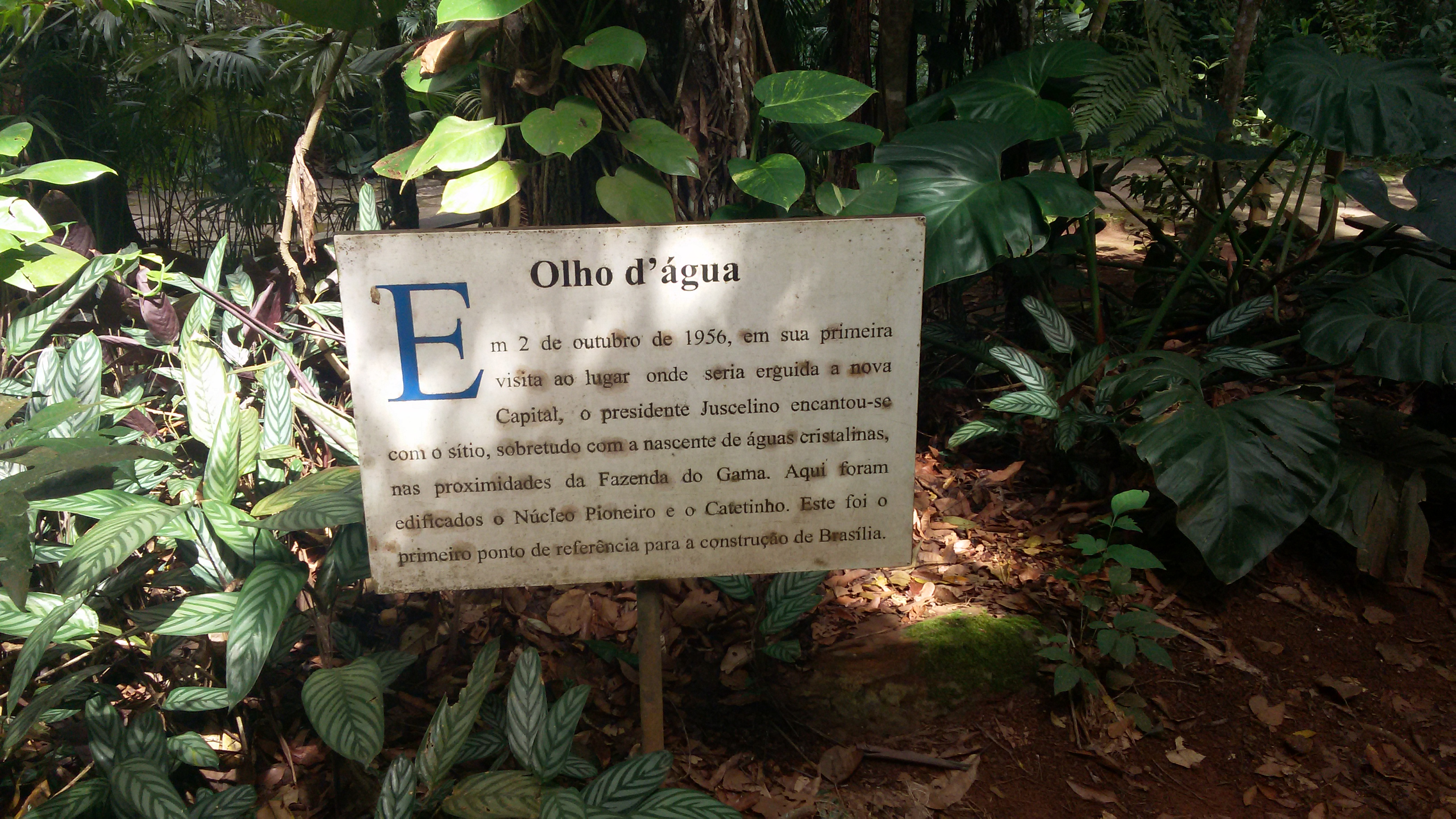 esta hablando sobre la fuente pero esta en portugués